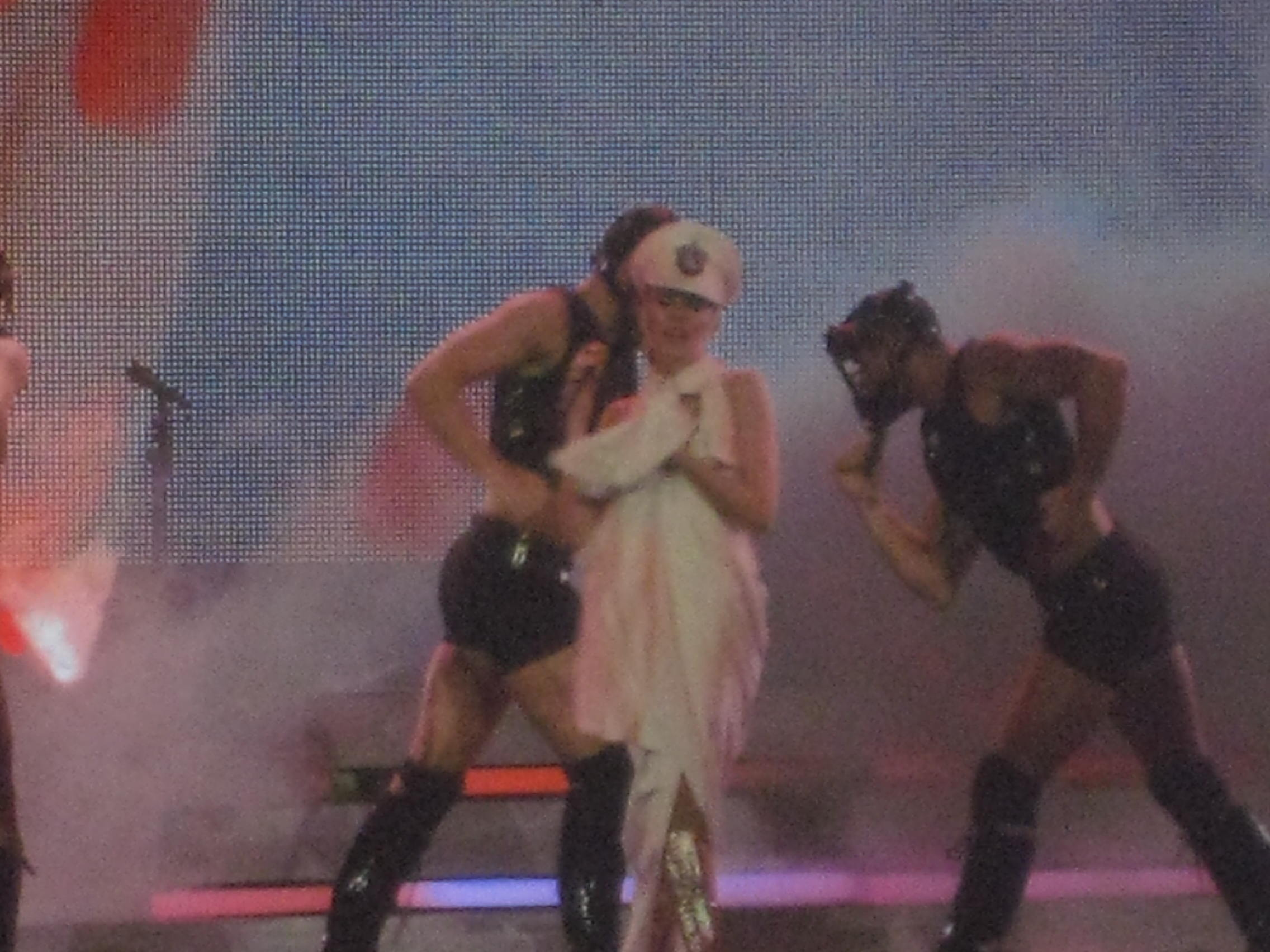 kylie minogue